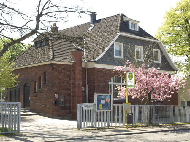 Das Haus des CVJM-Katernberg in Wuppertal